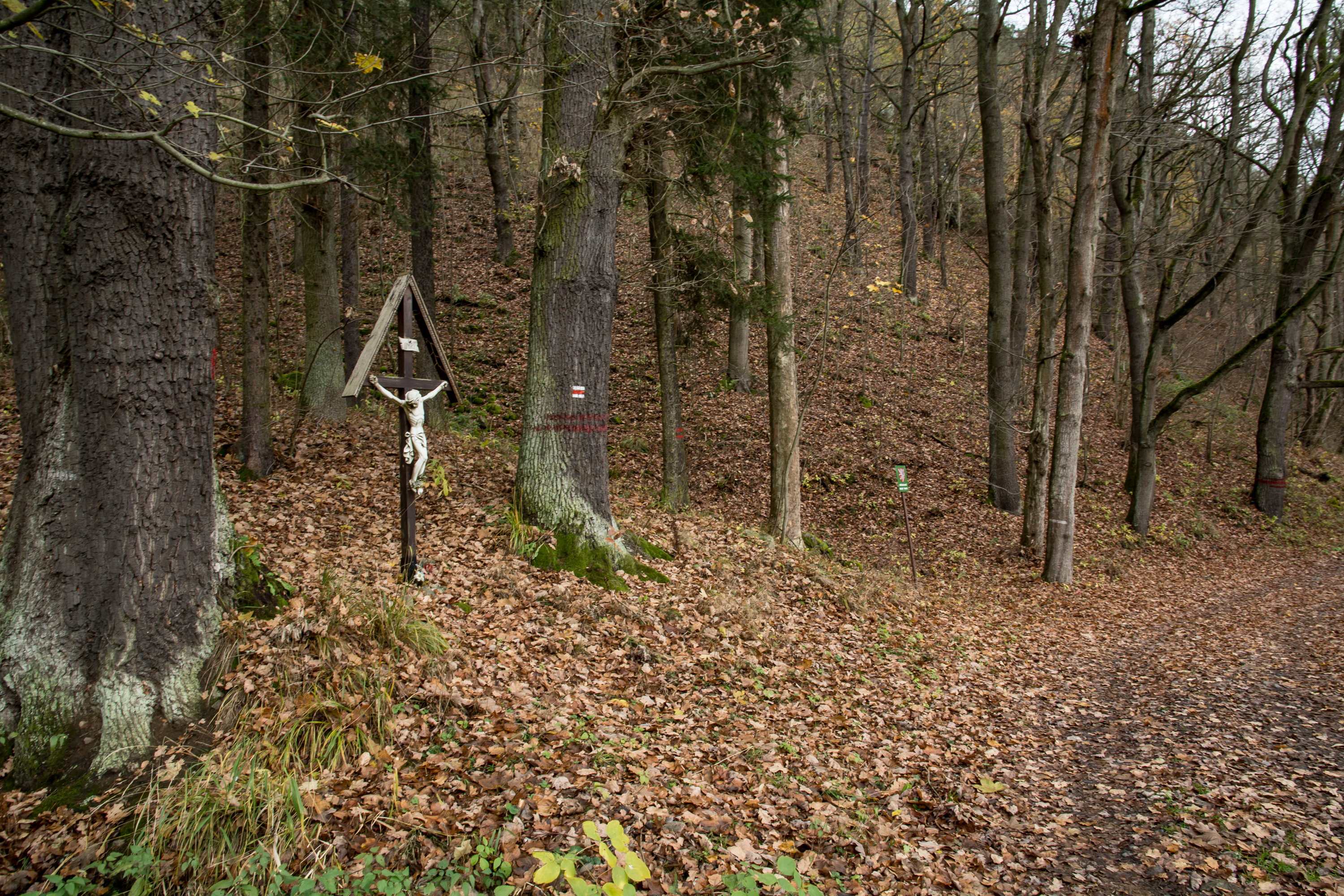 Pavlovická stráň, spodní část